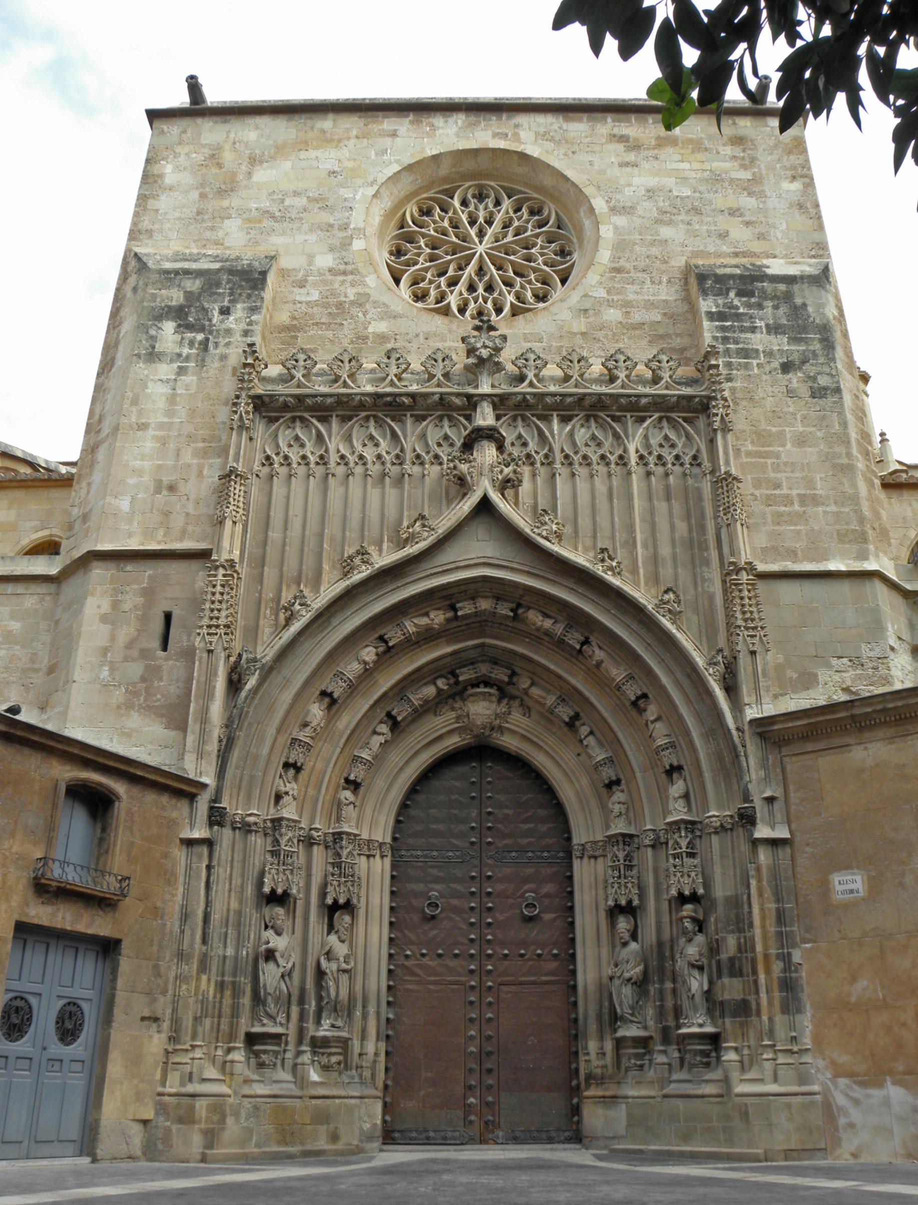 Puerta de los Apostoles, Catedral de Murcia